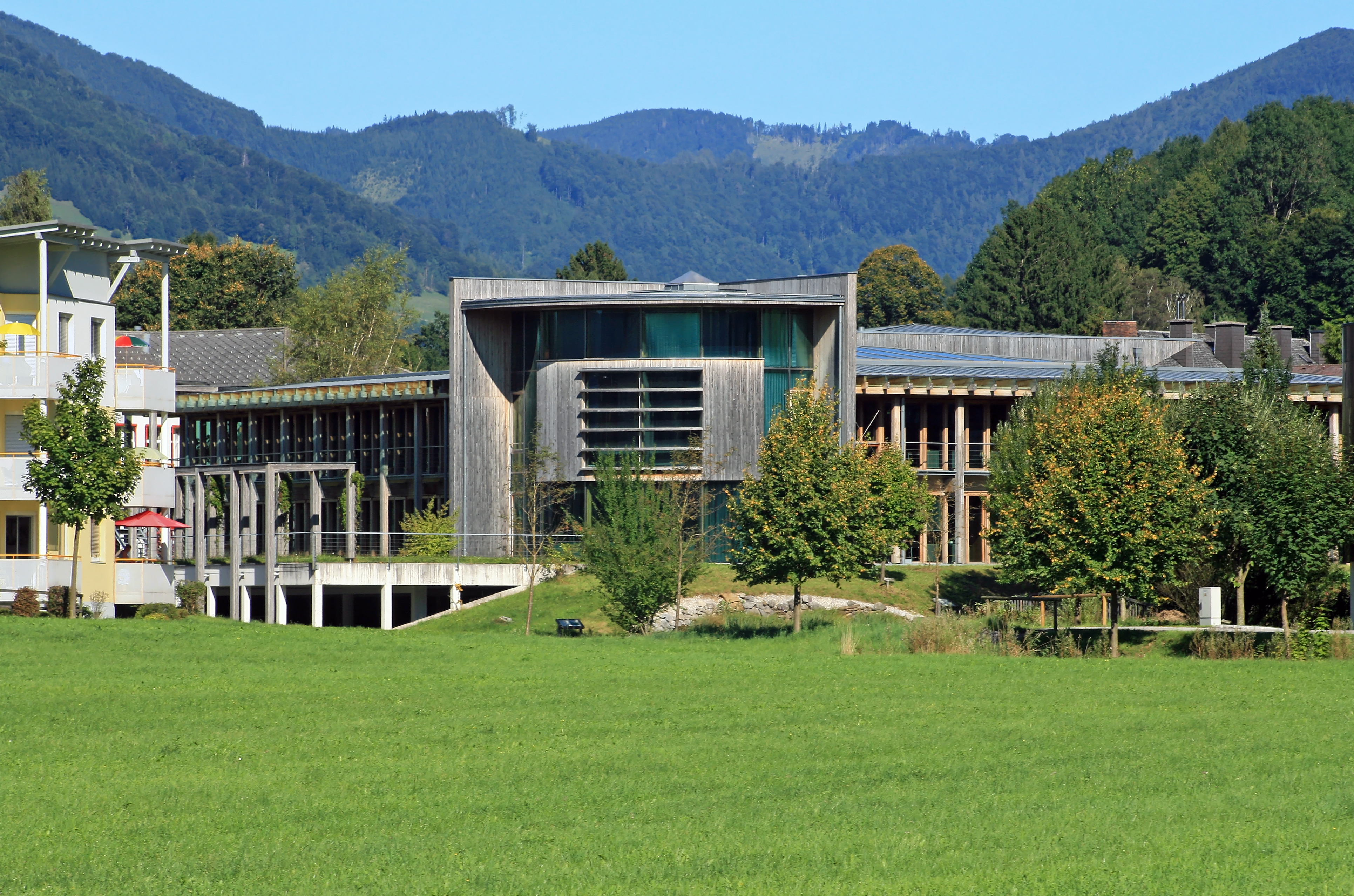 Die Wetterseite des Mollner Nationalpark-Zentrums